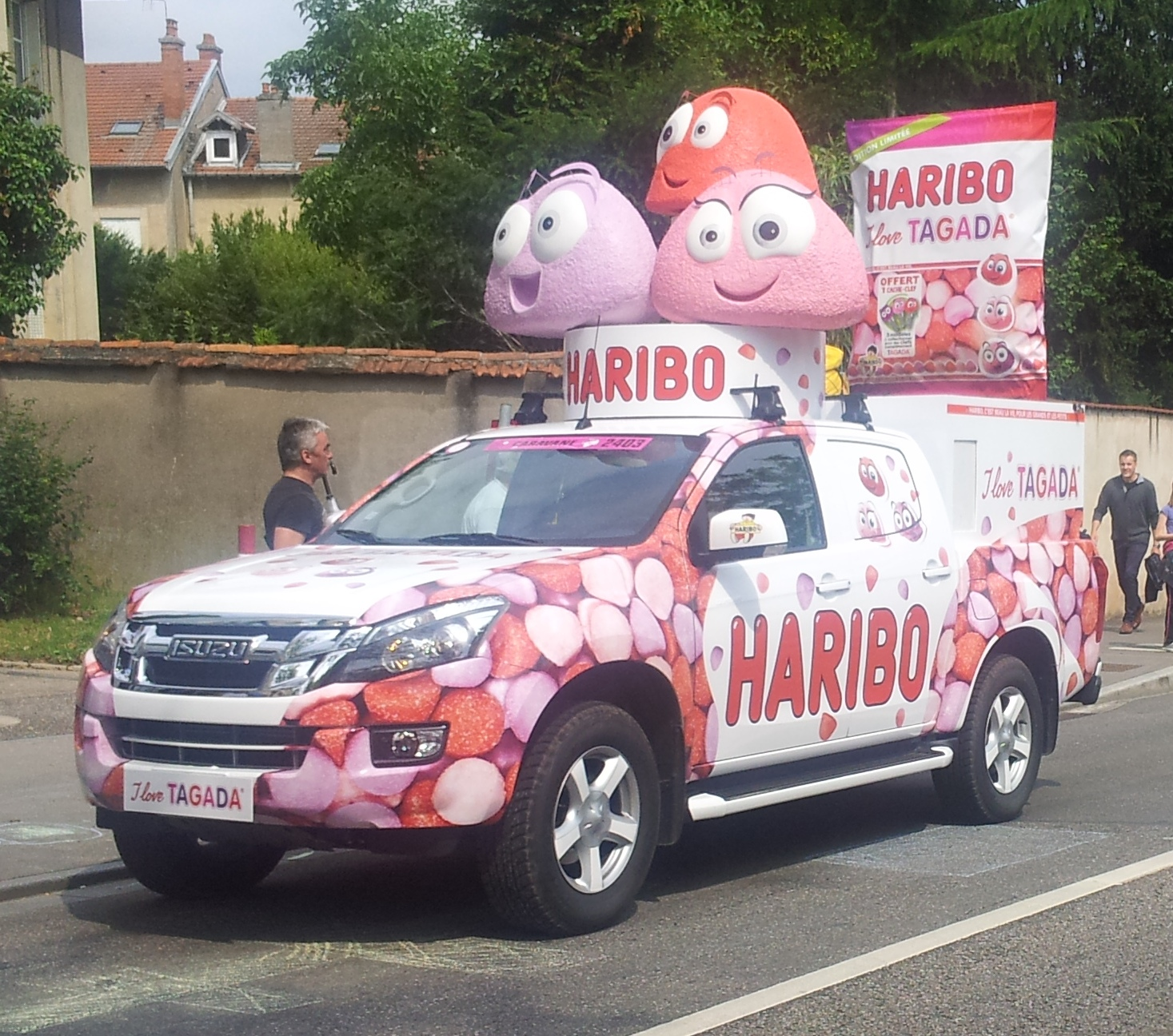 Véhicule de la caravane du Tour de France 2014 dans la côte de Boufflers à Nancy (7e étape).